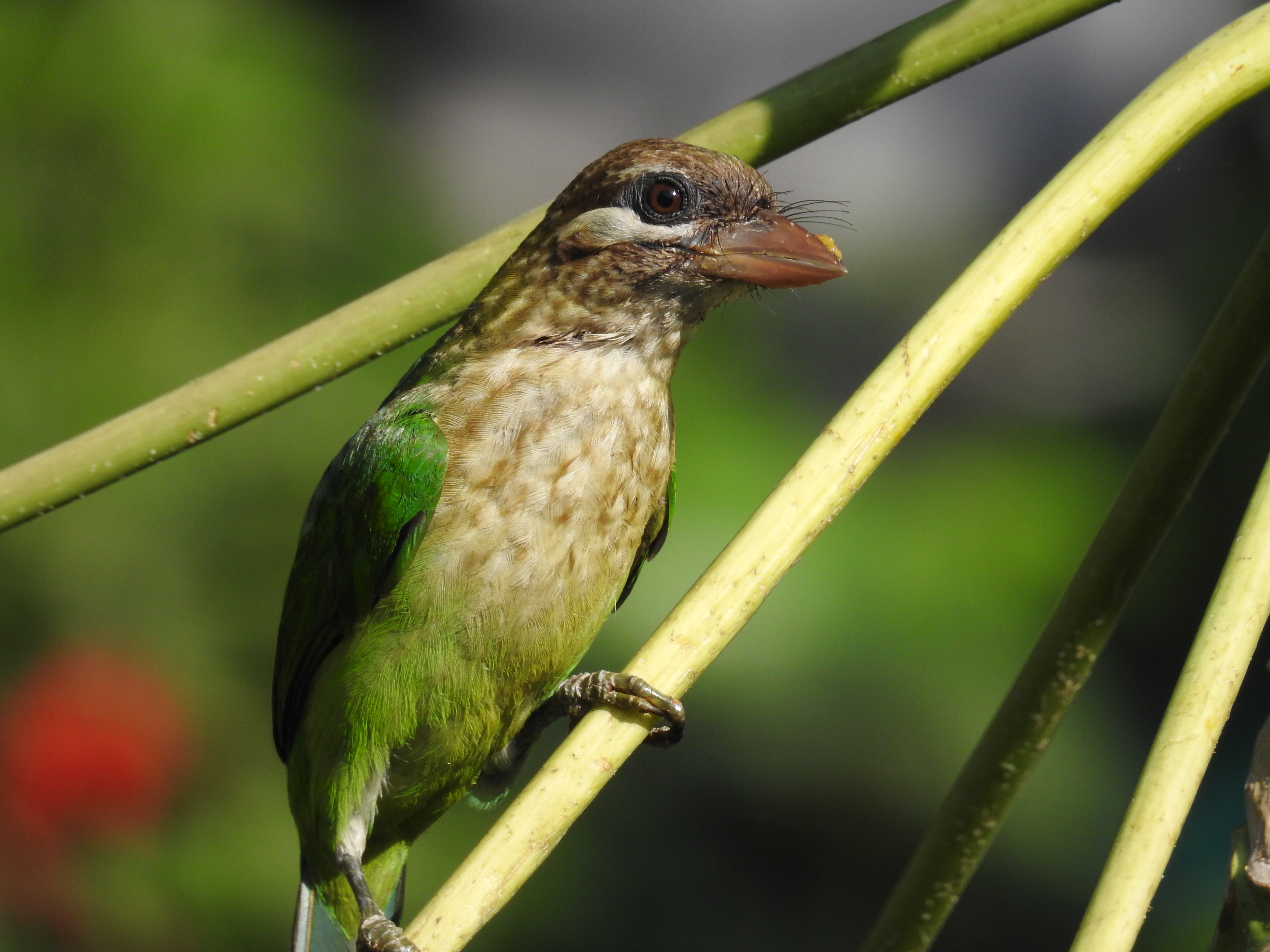 From kannur keeriyad